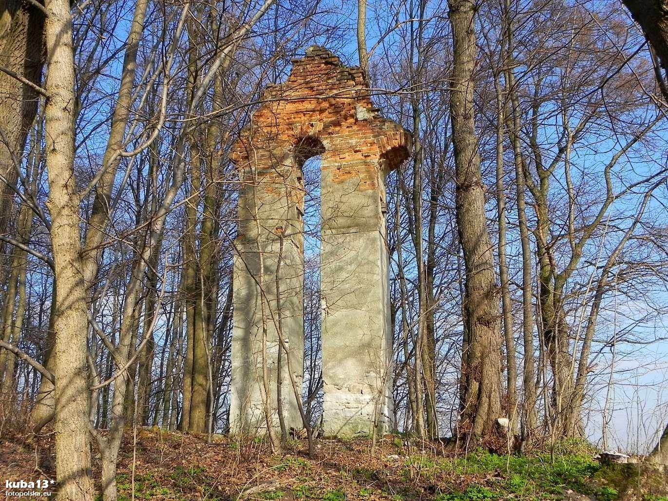 Cerkwisko w Podemszczyźnie. Jedynymi śladami są nieliczne nagrobki z krzyży bruśnieńskich i grożące zawaleniem pozostałości dzwonnicy przycerkiewnej.